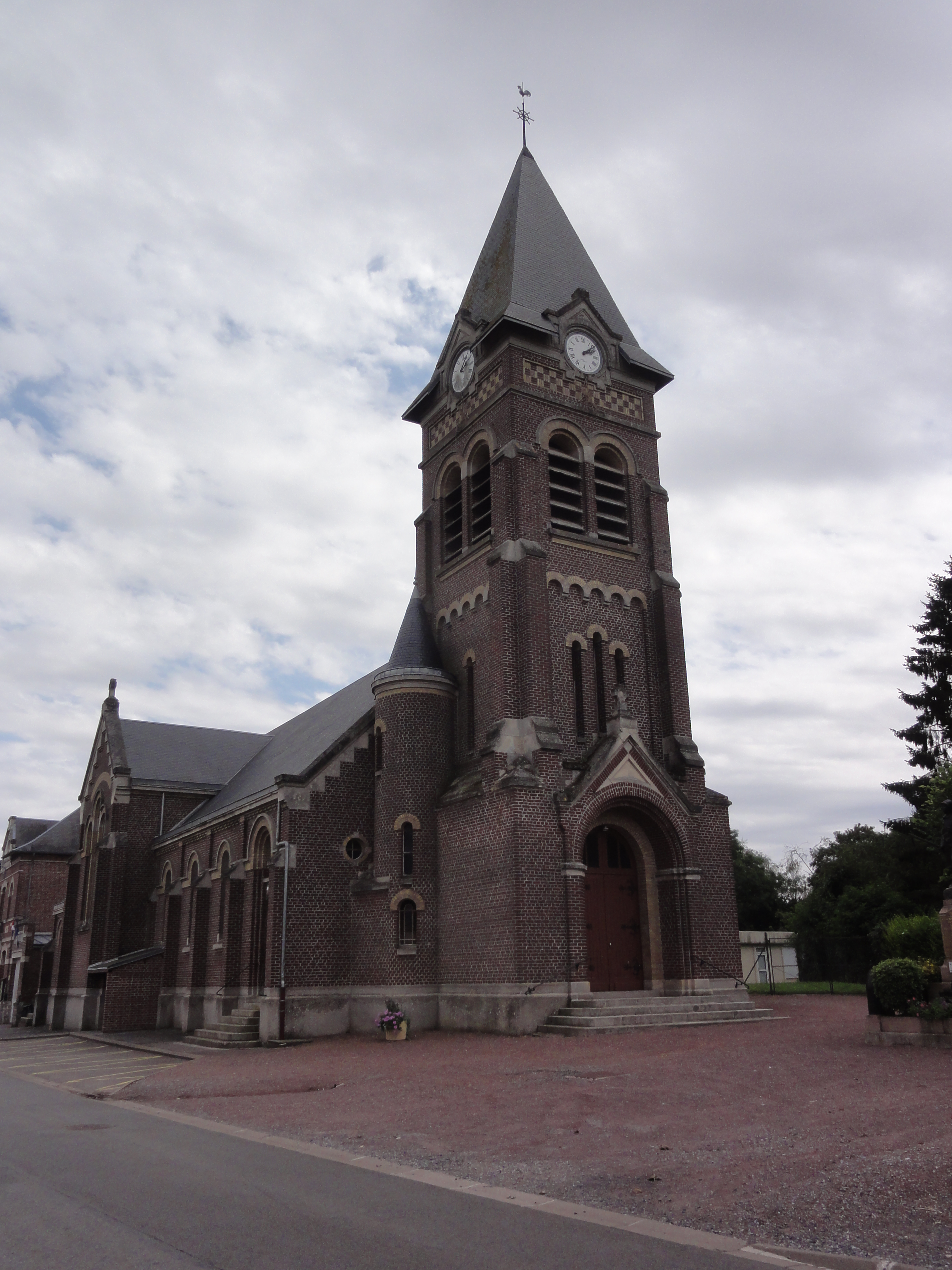 Cugny (Aisne) église Saint-Médard